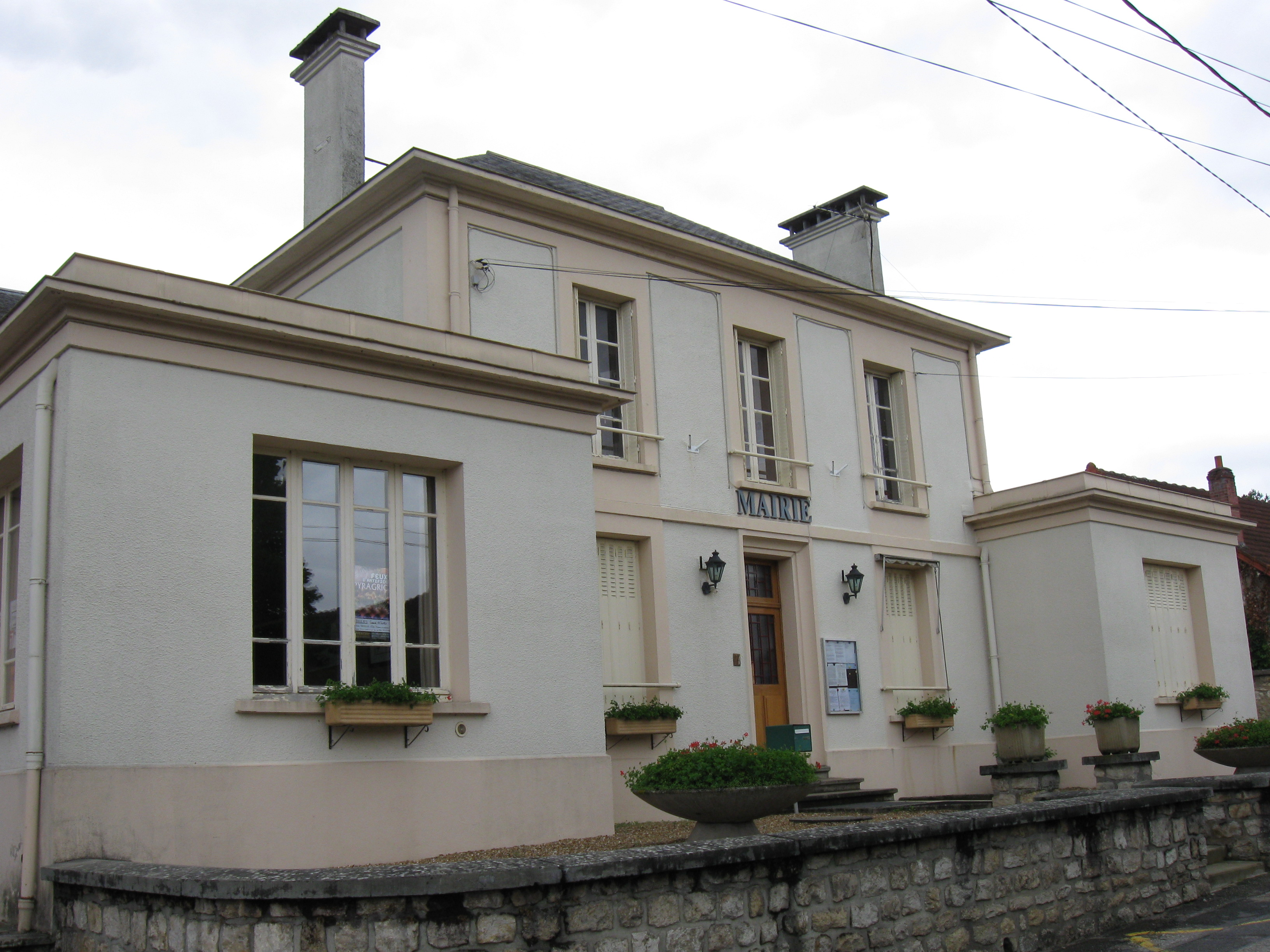 Mairie-école de Buthiers. (département de la Seine et Marne, région Île-de-France).